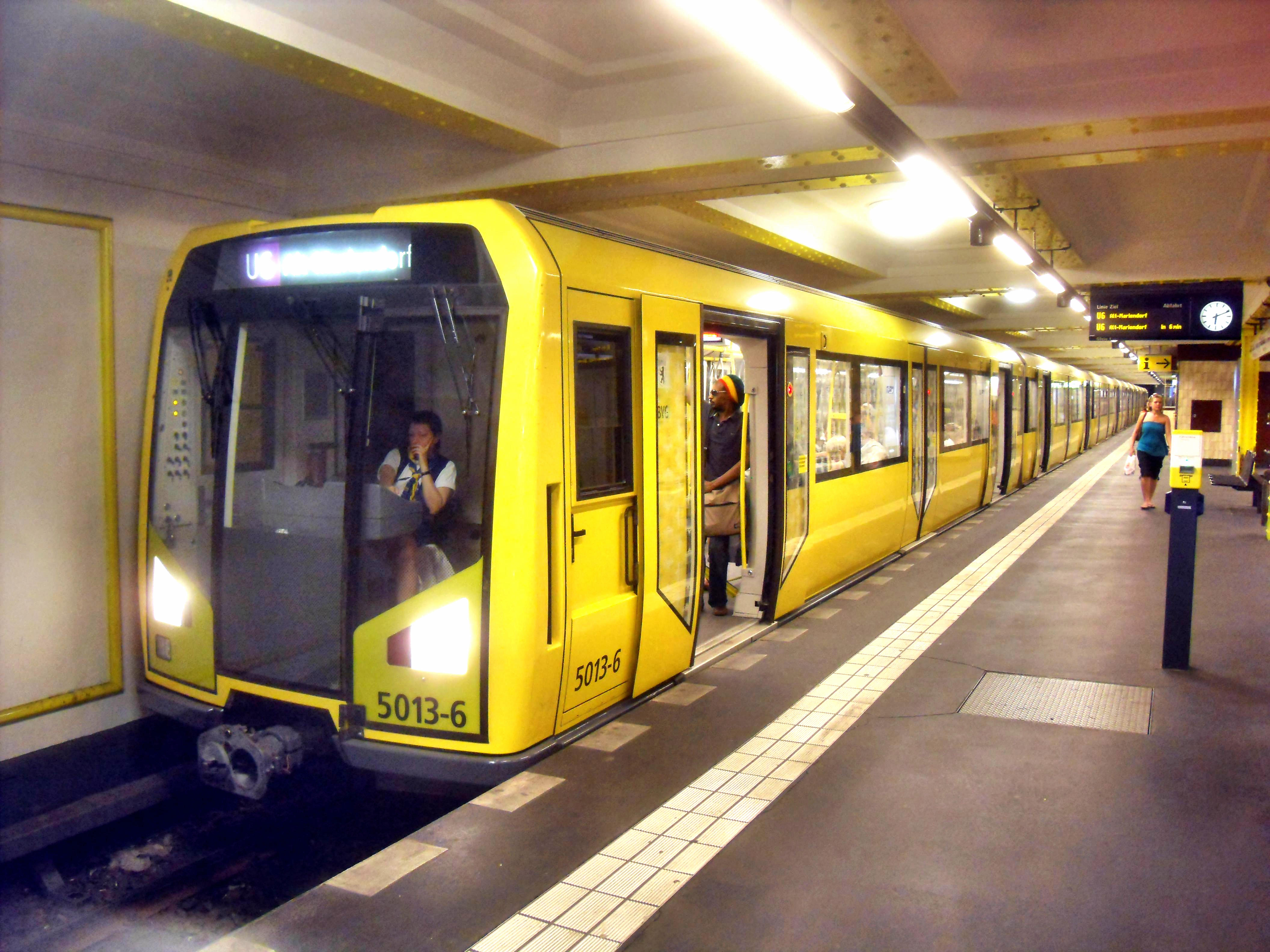 U-Bahn der Berliner U-Bahn in der U-Bahn-Station Kochstraße auf dem Weg nach Alt-Mariendorf